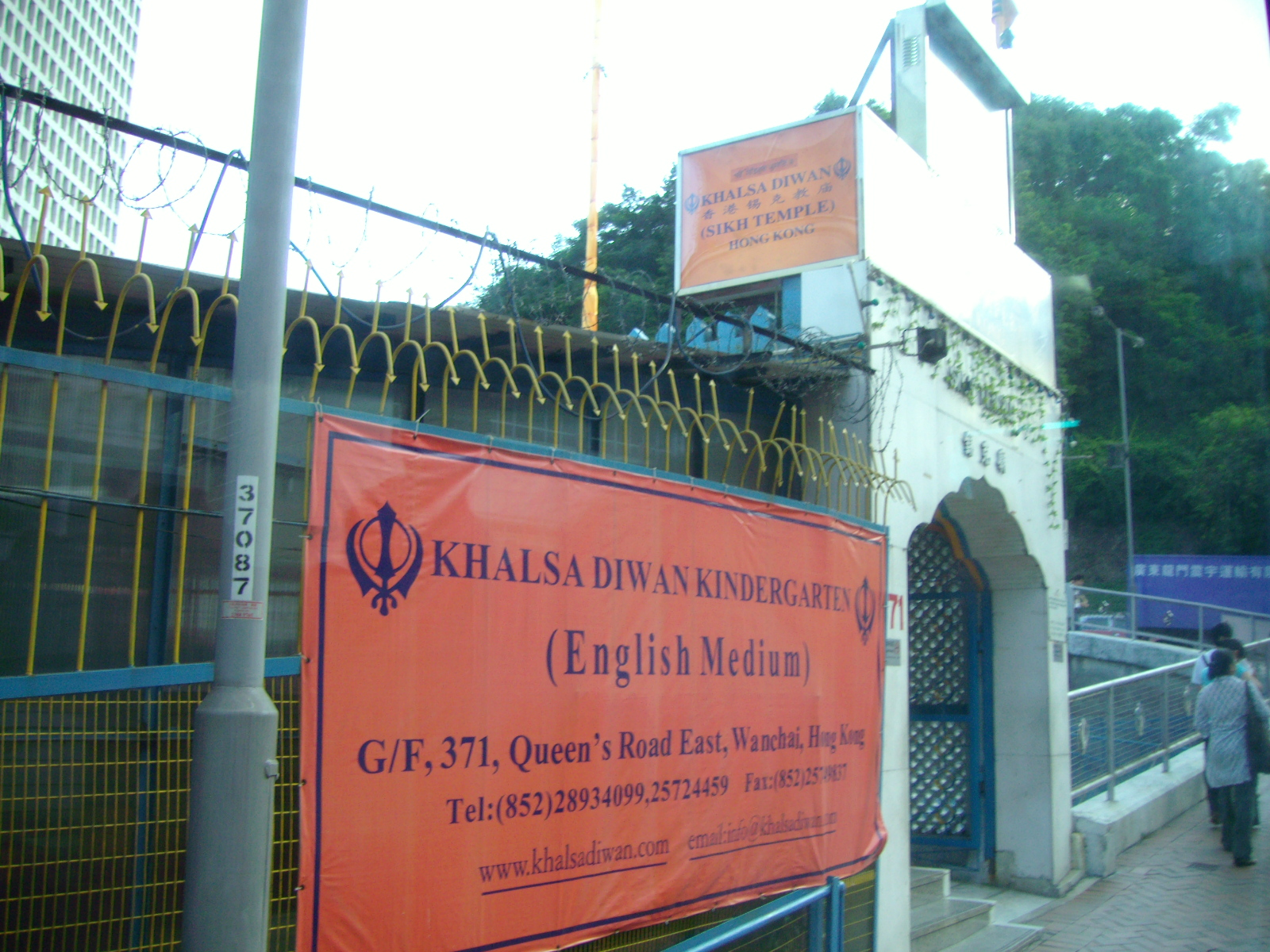 中文（中国大陆）: 香港锡克教庙